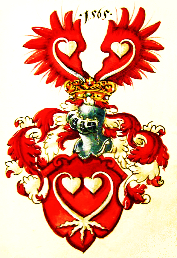 Wappen der Martinic (Darstellung aus Anlass für Jaroslav Borsita von Martinic 1565)